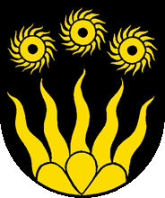 Wappen von Matt Kanton Glarus Schweiz